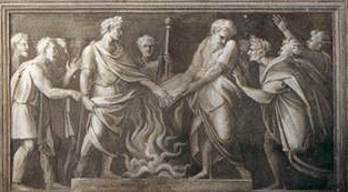 The Parnassus Fresco, width at base 670 cm Stanza della Segnatura, Palazzi Pontifici, Vatican